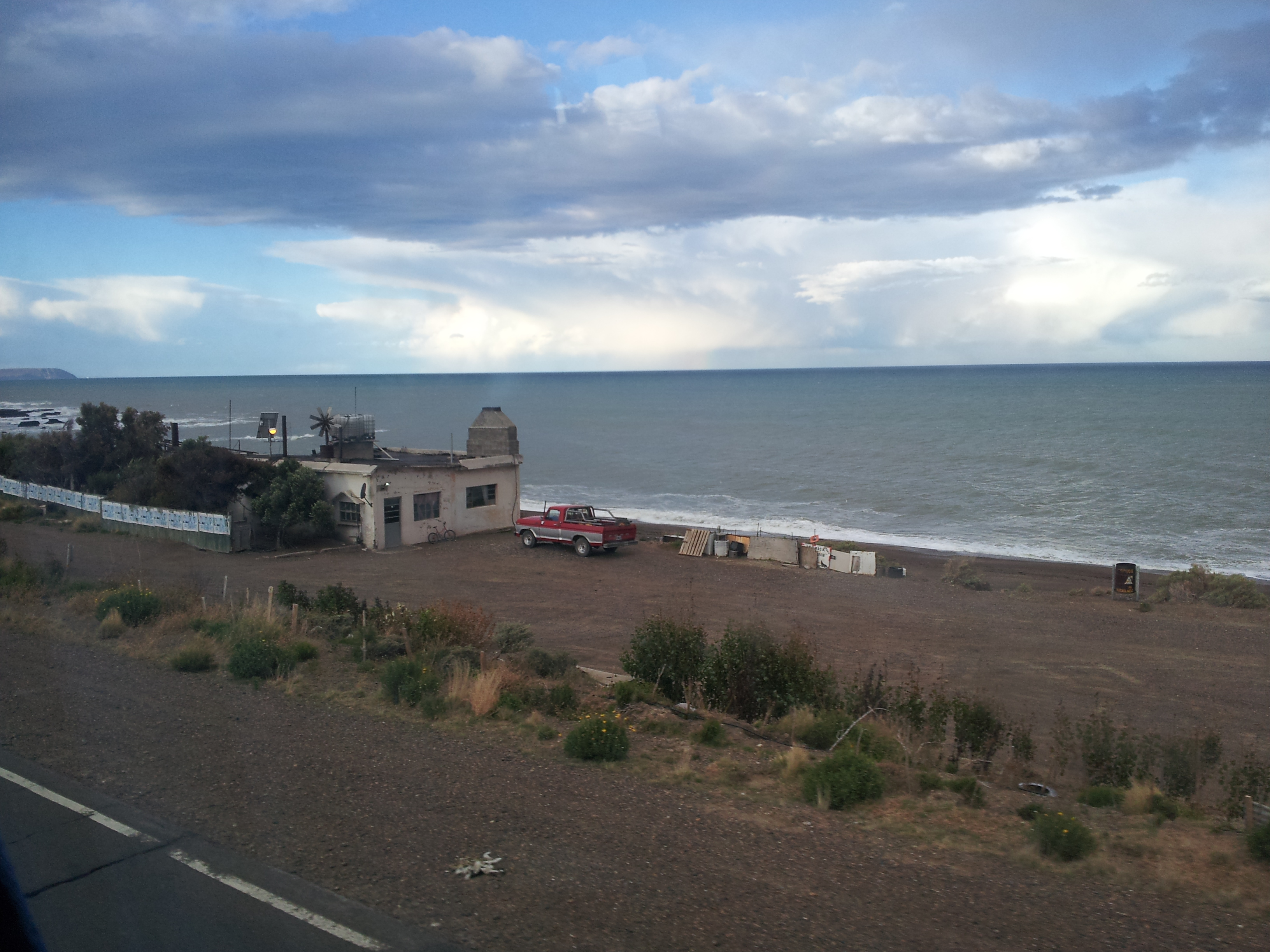 Paraje La Lobería (Santa Cruz)